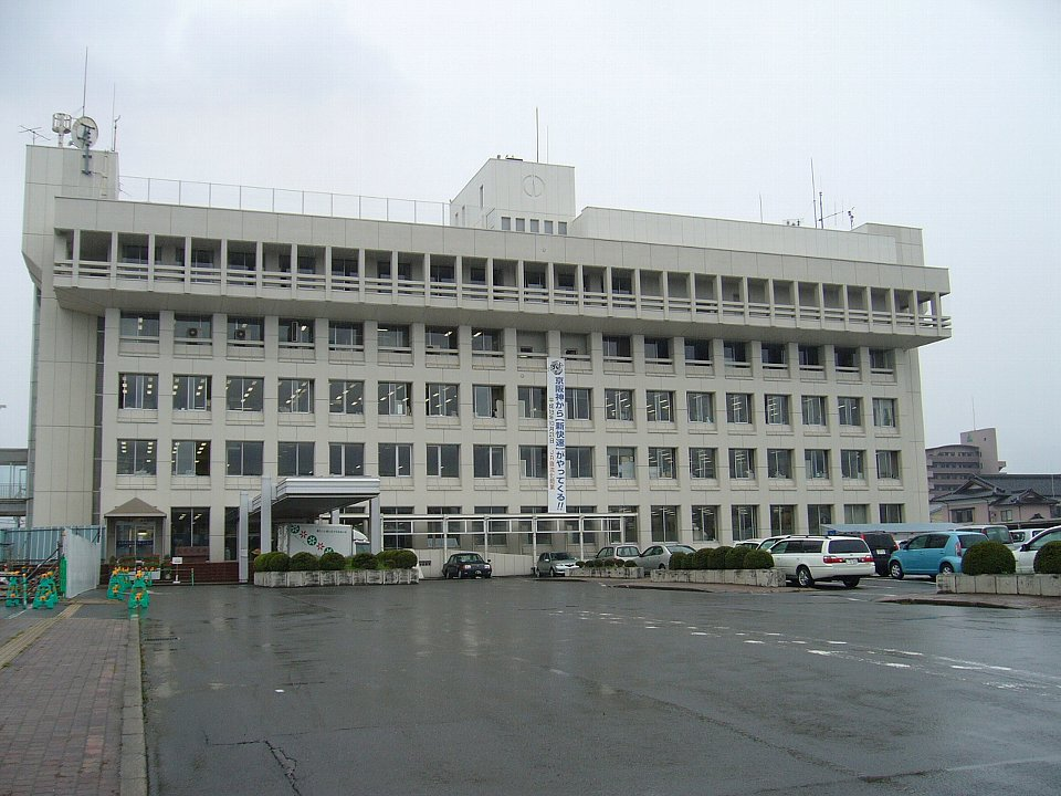 敦賀市役所 2006年9月13日 Bakkai撮影 Category:官公庁の画像